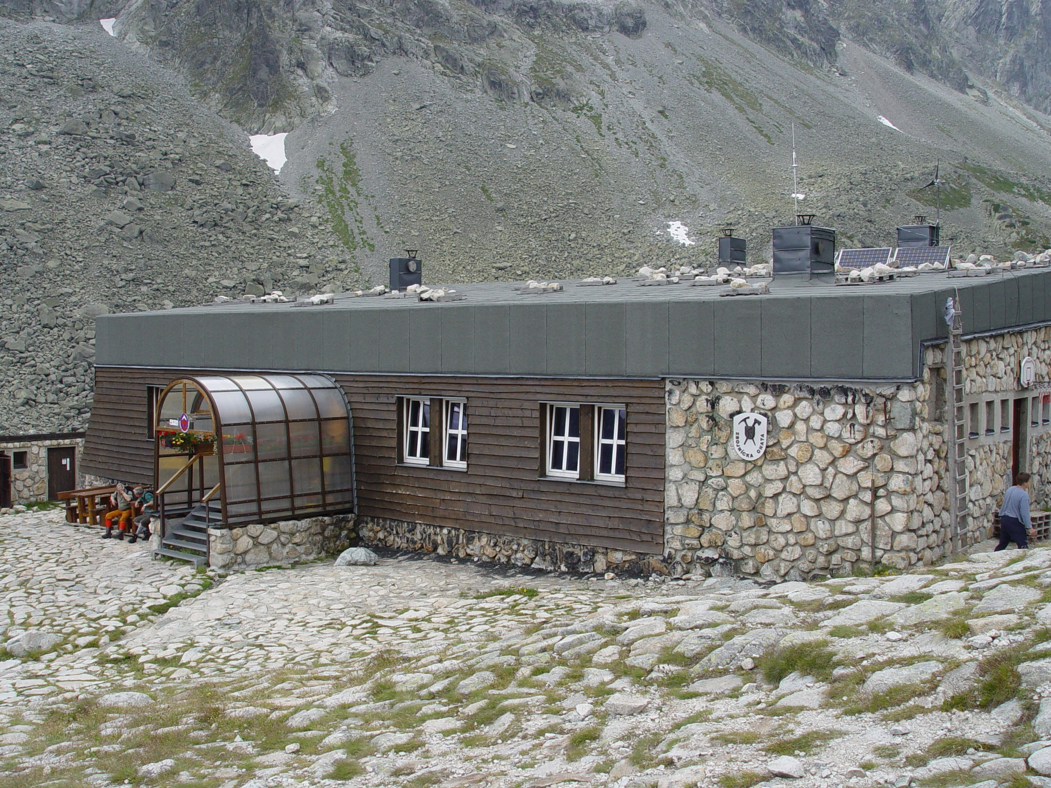 Magas-Tátra,_Nagy-Tarpataki-völgy,_Hosszó-tavi Rabló_mh.jpg